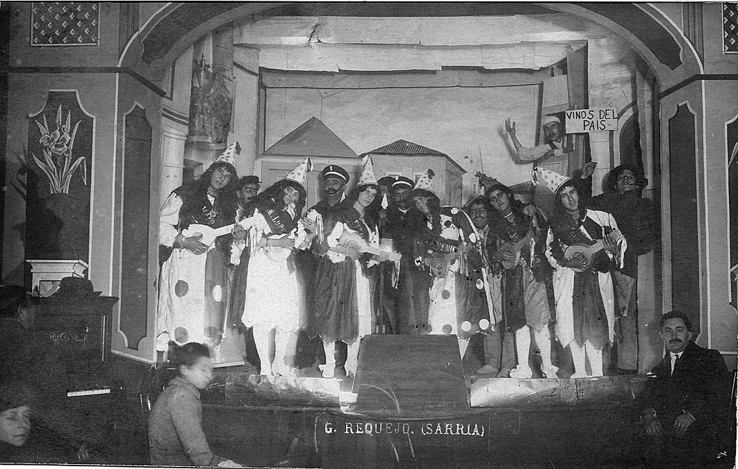 Teatro-Salon. Sarria, Galicia, Spain